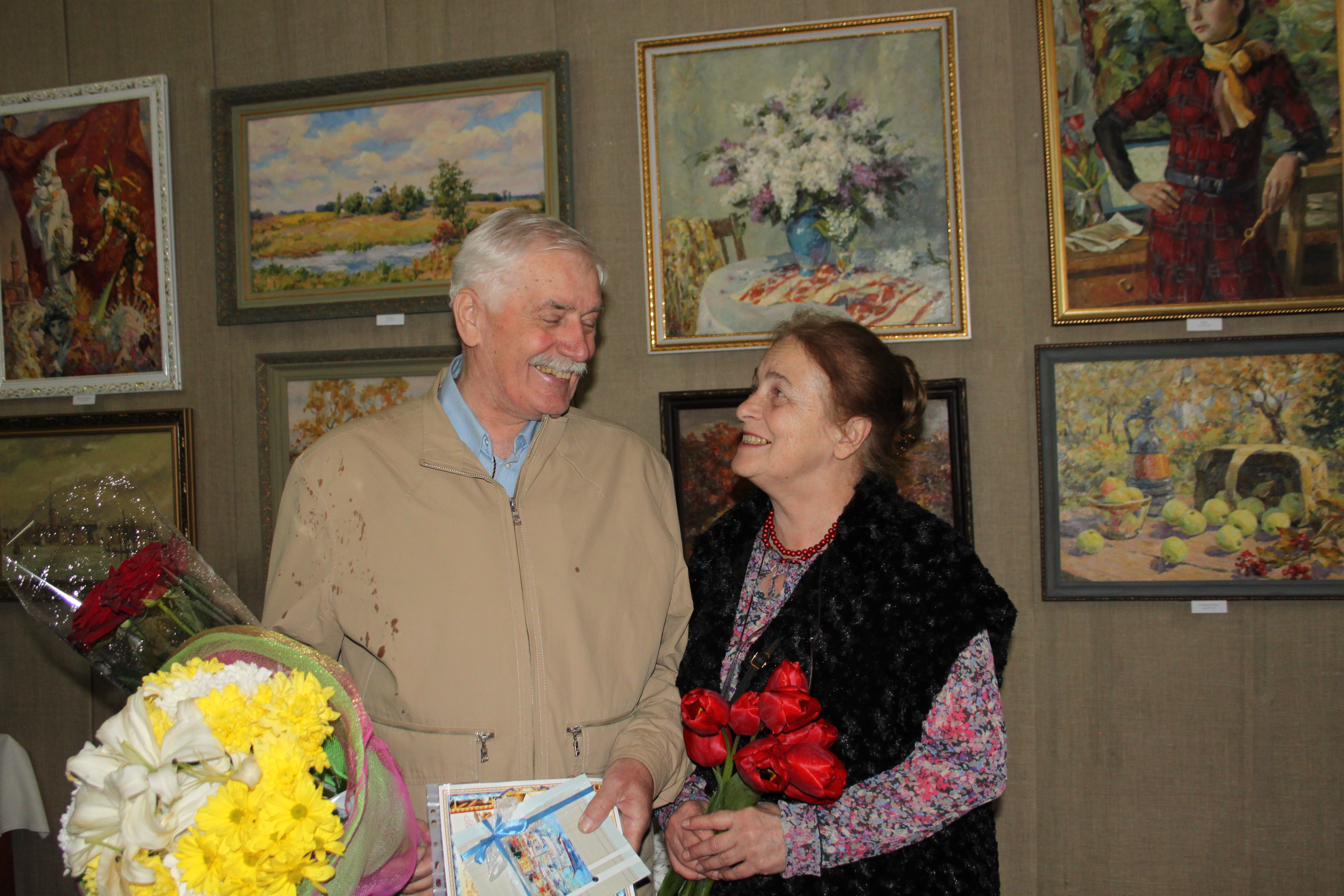 Степан Ніколенко з дружиною Тетяною, 20.04.2016